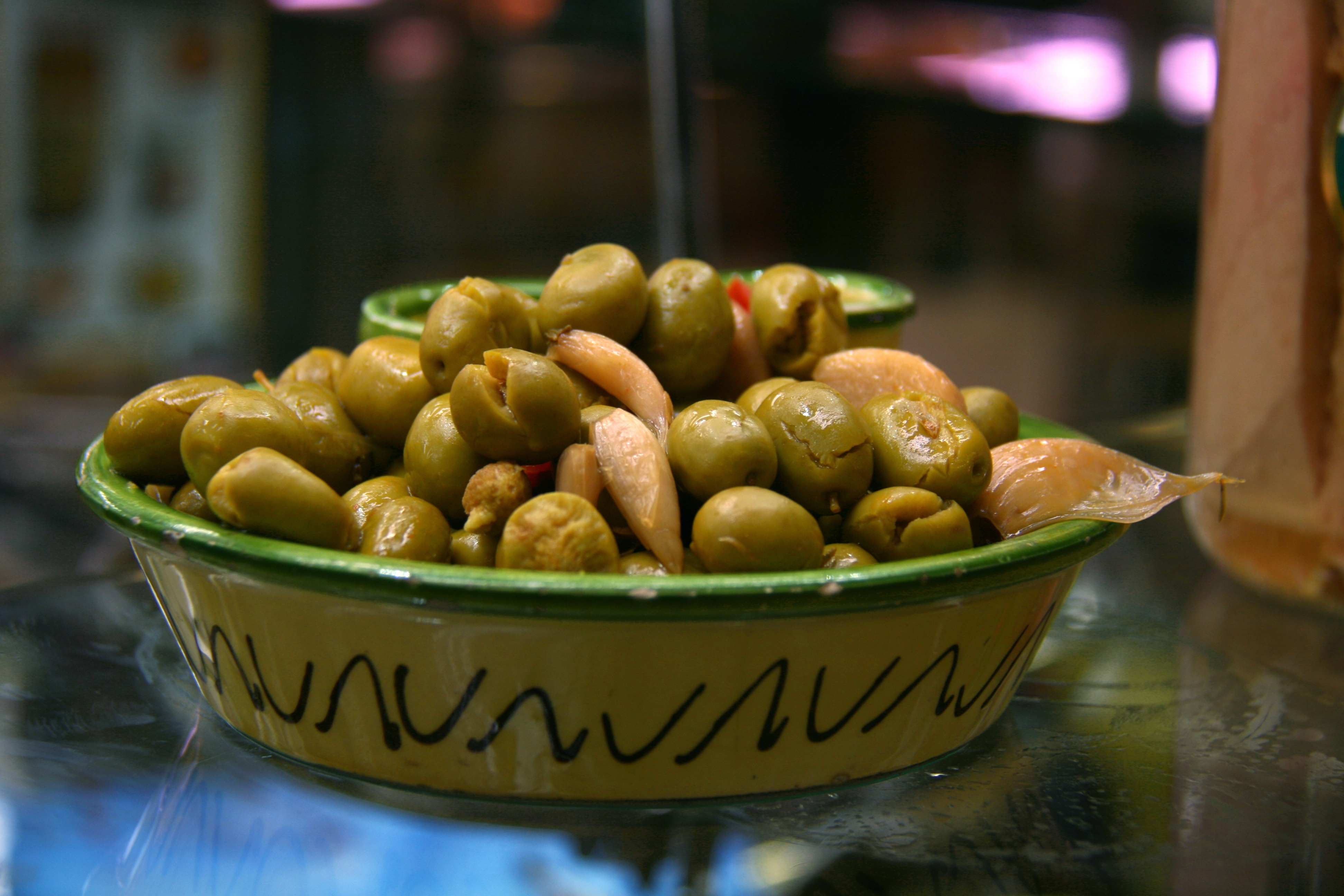 Olivas aliñadas con ajo (al estilo de la abuela)